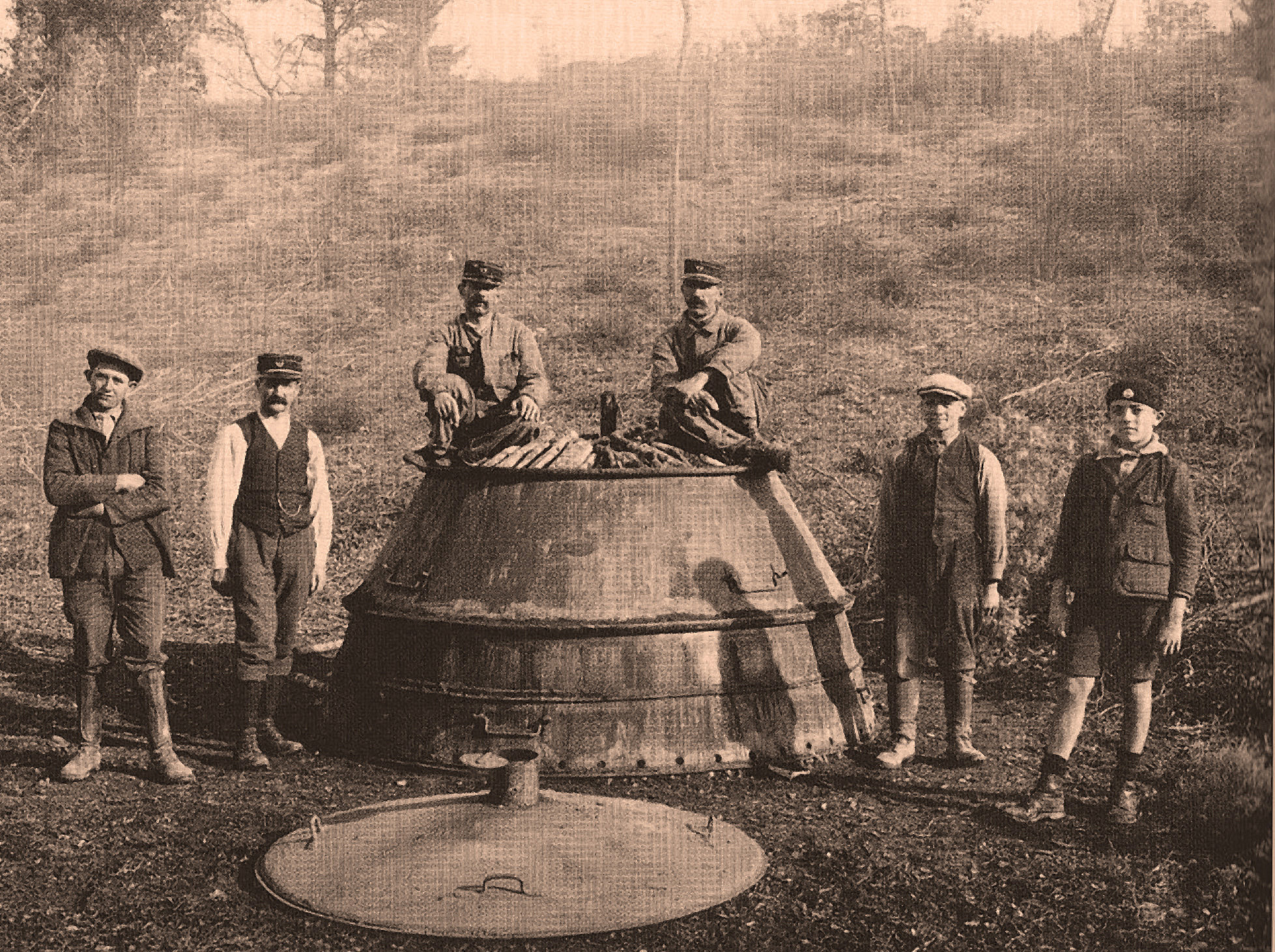 Gardes forestiers sur une charbonnière métallique, vers 1930, dans la montagne de Lure